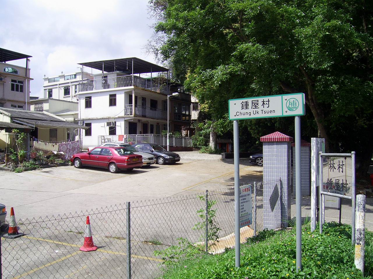 鍾屋村